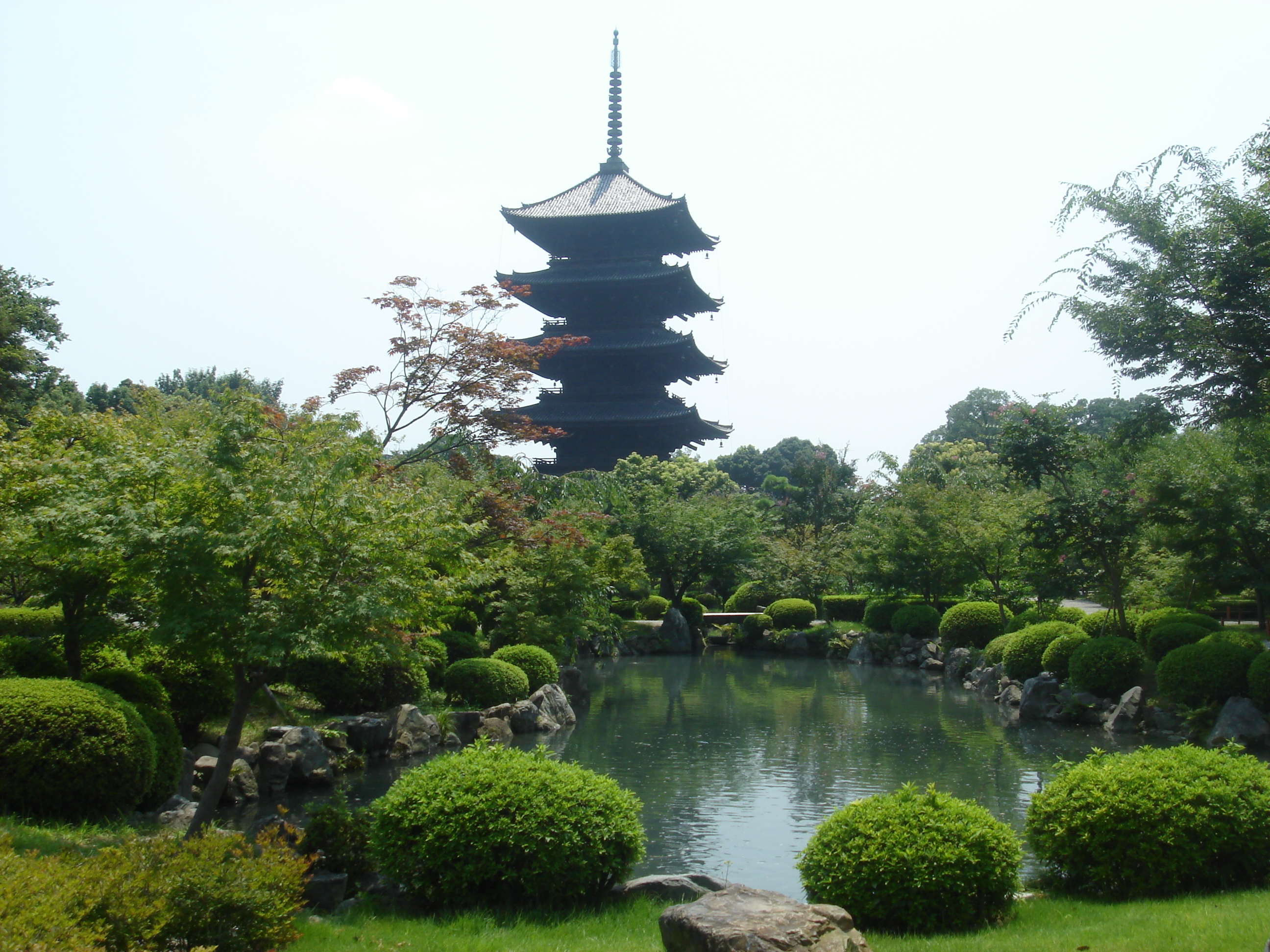 Toji pagoda in Kyoto, Japan